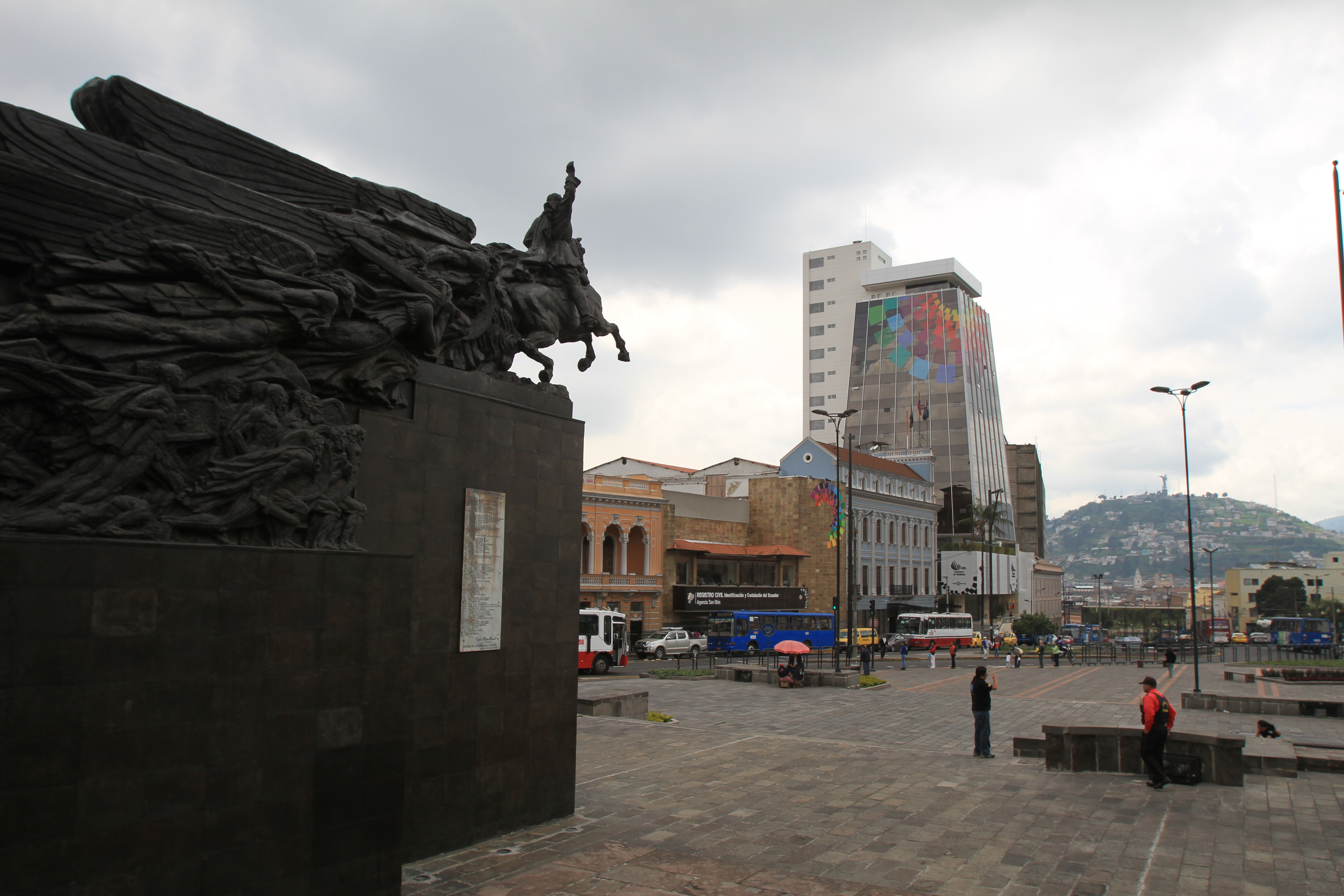 Ministerio de Turismo Edificio La Licuadora (9)